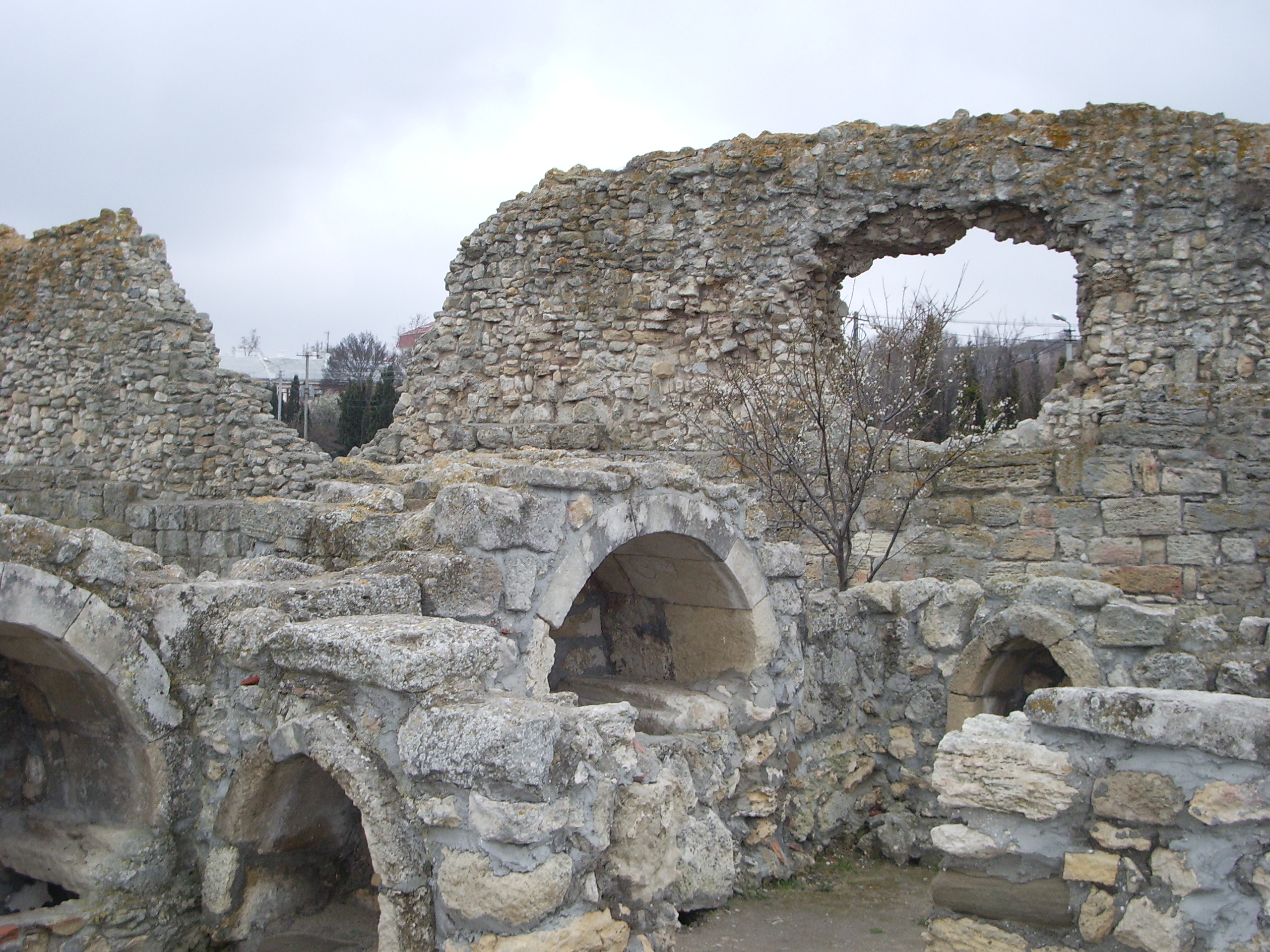 Храм с аркосолиями. Херсонес. Севастополь. Крым. Март 2010